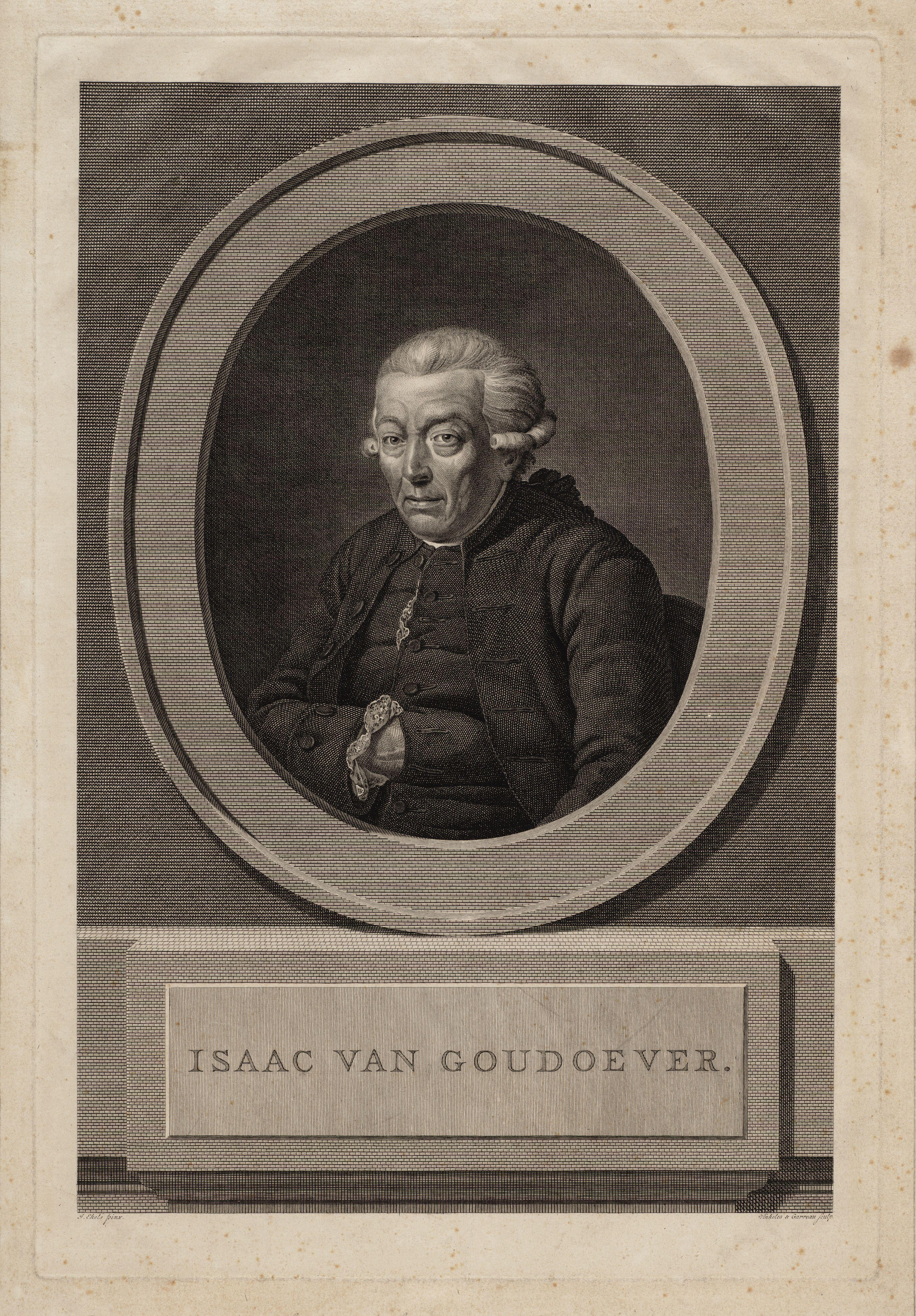 Beschrijving Isaac van Goudoever (26-10-1720 / 17-09-1793) Kolonel der Amsterdamse schutterij in 1787. Afmetingen: 357 x 240 mm. Documenttype prent Vervaardiger Vinkeles, R. (Reinier ; 1741-1816) Ekels de jonge, Jan (1759-1793) Garreau, L. Collectie Collectie Stadsarchief Amsterdam: tekeningen en prenten Inventarissen Afbeeldingsbestand 010097014361